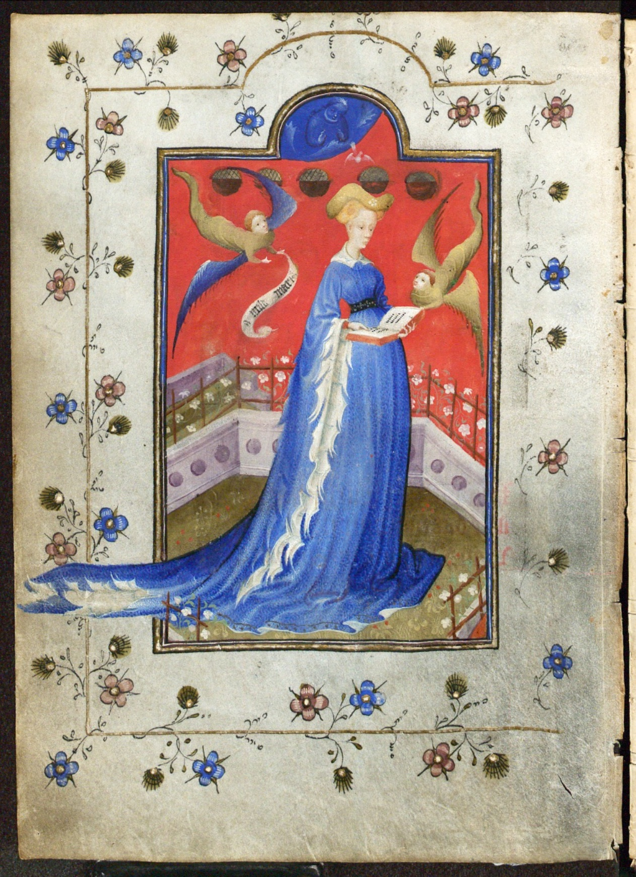 Miniatuur van Maria van Gelre, staand in een hortus conclusus. Vervaardigd door de Meester van Maria van Gelre